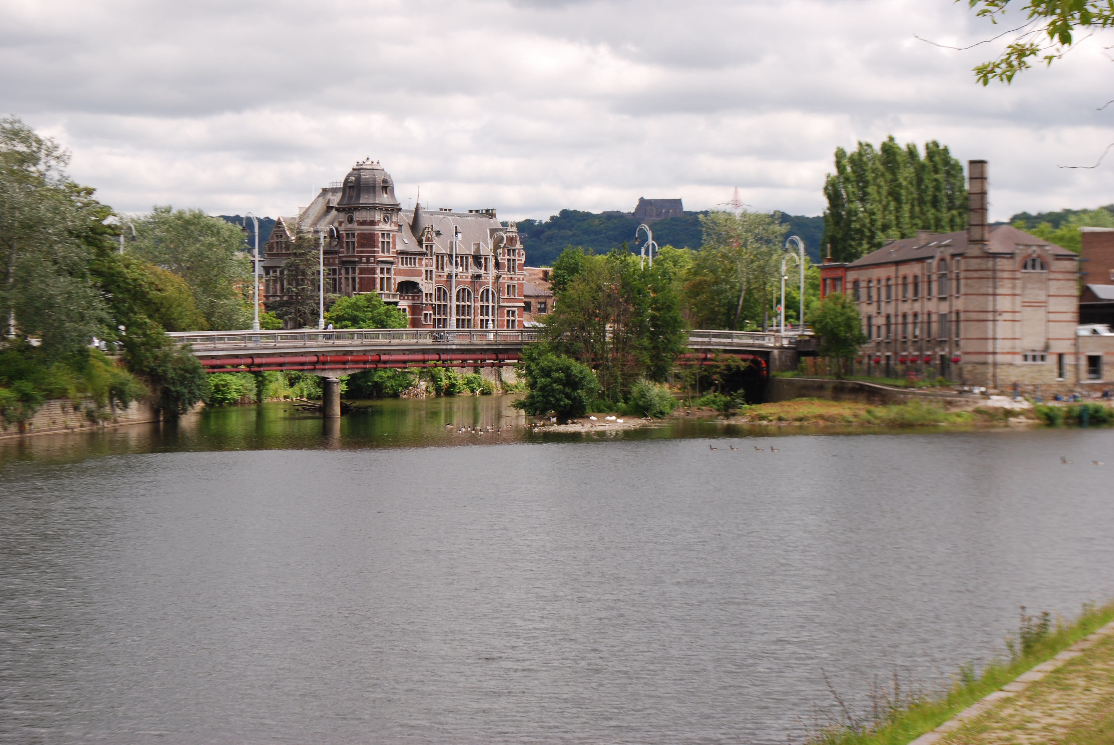 Le confluent de la Vesdre et de l'Ourthe à Chênée (Liège).